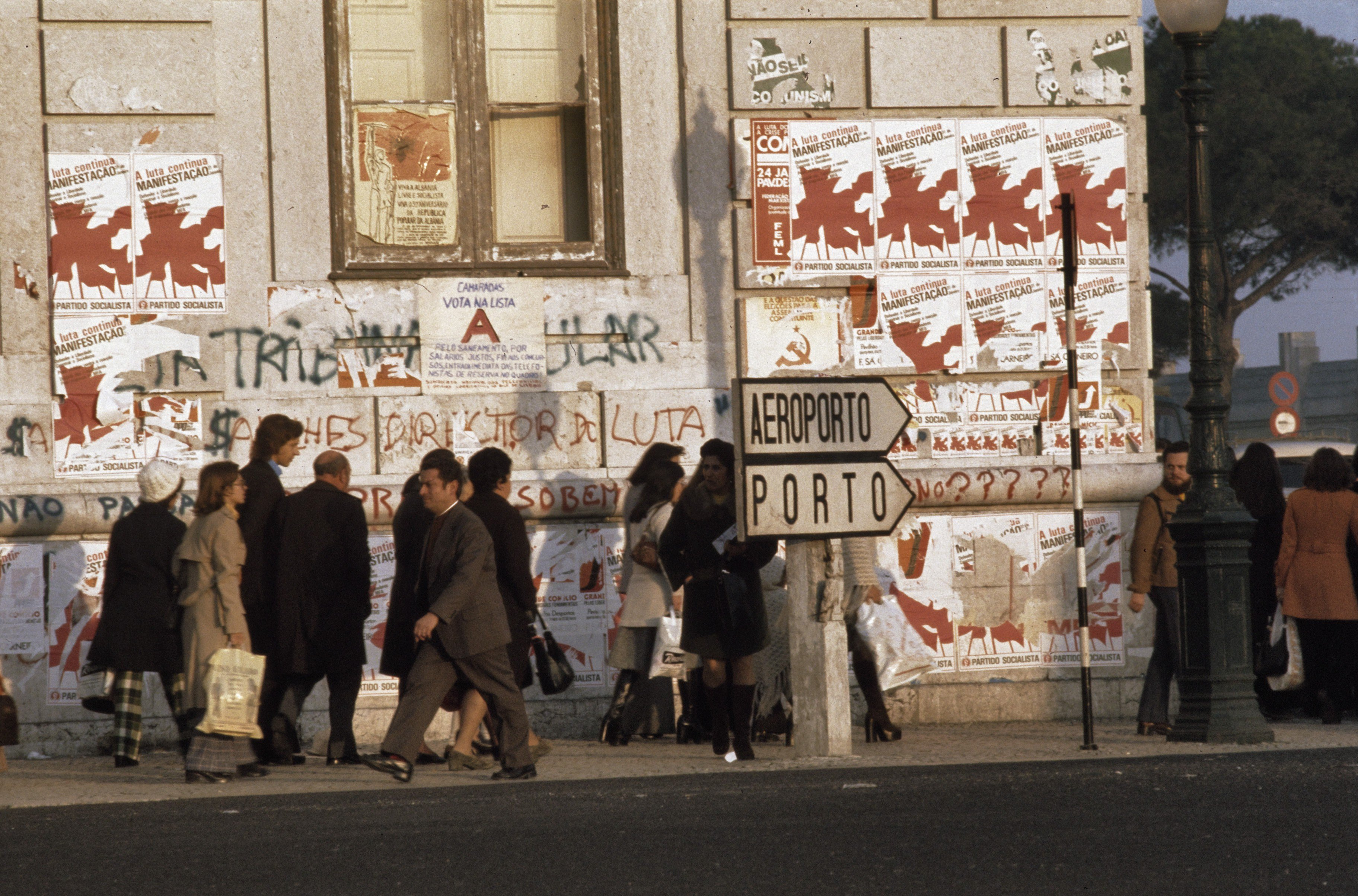 Collectie / Archief : Fotocollectie Anefo Reportage / Serie : [ onbekend ] Beschrijving : Serie Portugal, verkiezingsstrijd/straatbeelden in Lissabon (begin 1975); straatbeelden met verkiezingsaffiches Datum : 1975 Locatie : Lissabon, Portugal Trefwoorden : politiek, verkiezingen Fotograaf : Mieremet, Rob / Anefo Auteursrechthebbende : Nationaal Archief Materiaalsoort : Dia (kleur) Nummer archiefinventaris : bekijk toegang 2.24.01.06 Bestanddeelnummer : 254-9566